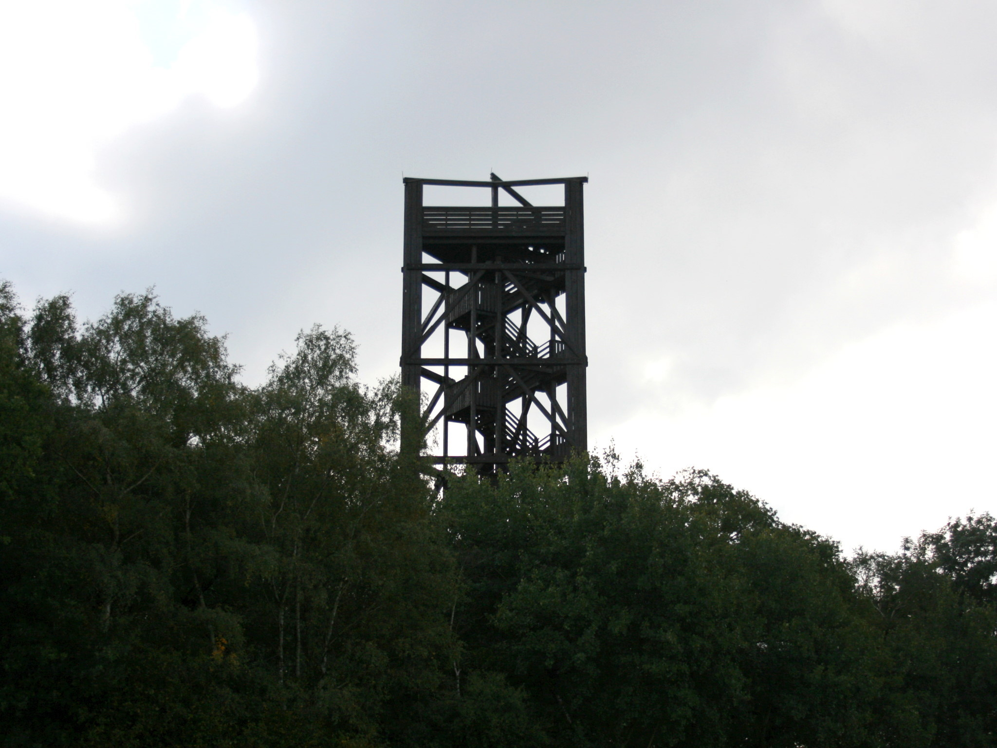 Aussichtsturm am Dursberg in Sonsbeck